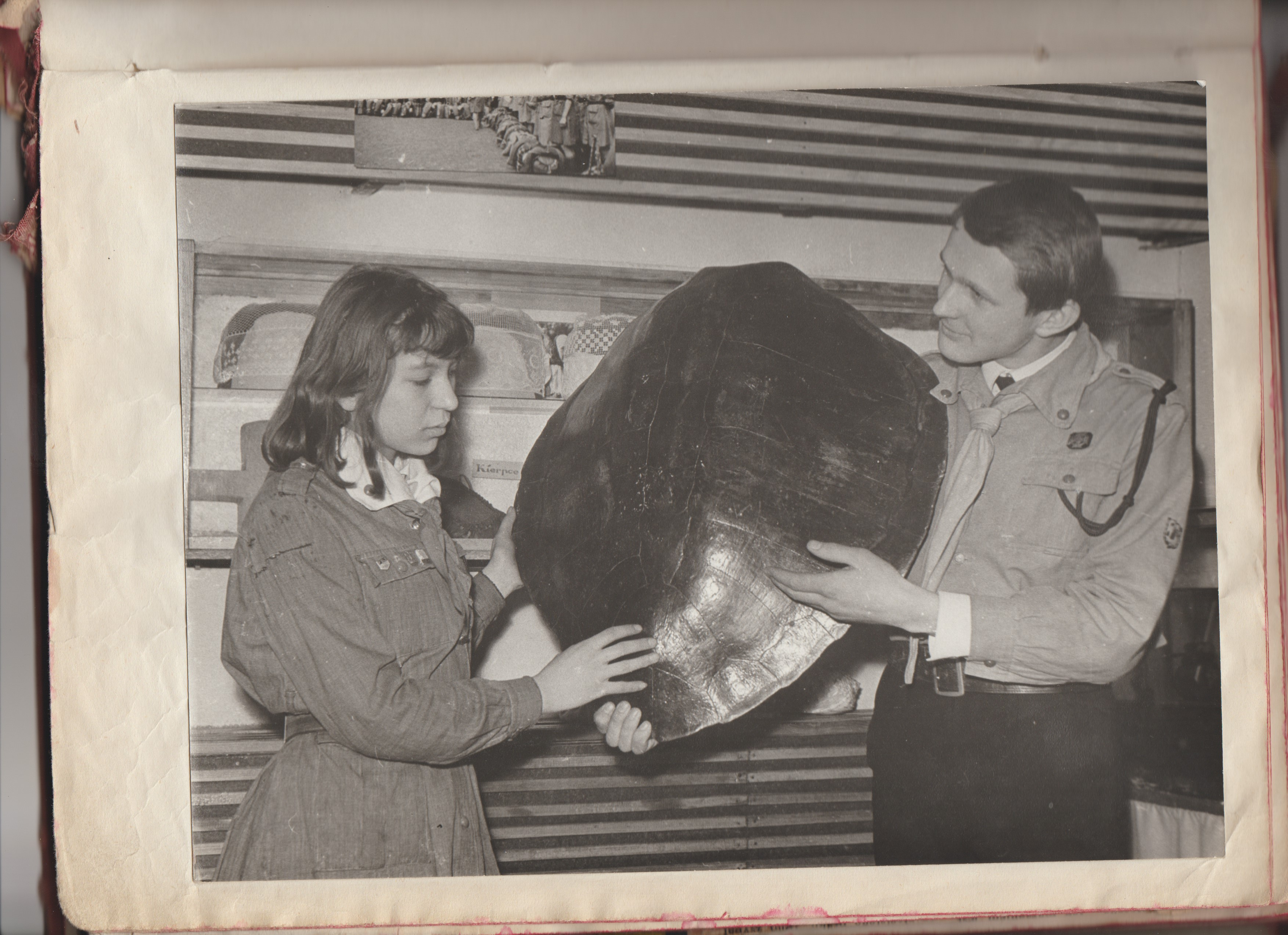 Skorupa żółwia z Gwinei. Jeden z eksponatów przywiezionych do muzeum przez Państwo Dudków.